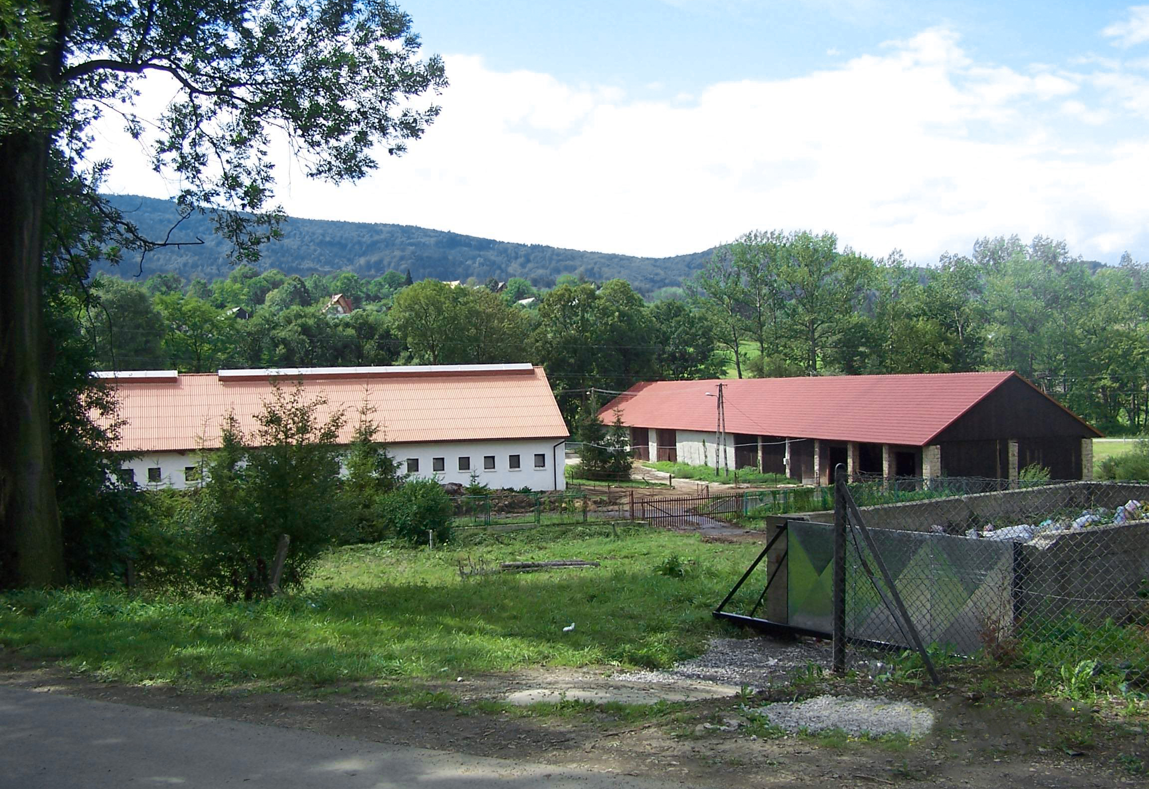 Photo by Piotrus. Państwowe Gospodarstwo Rolne in Szczyrzyc, Poland.